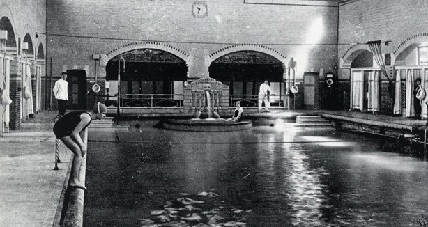 O.Z.E.B.I., een zwem- en badgelegenheid aan de Biltstraat 4, te Utrecht. In de foto uit 1928 is zichtbaar de grote hal met zwembassin.